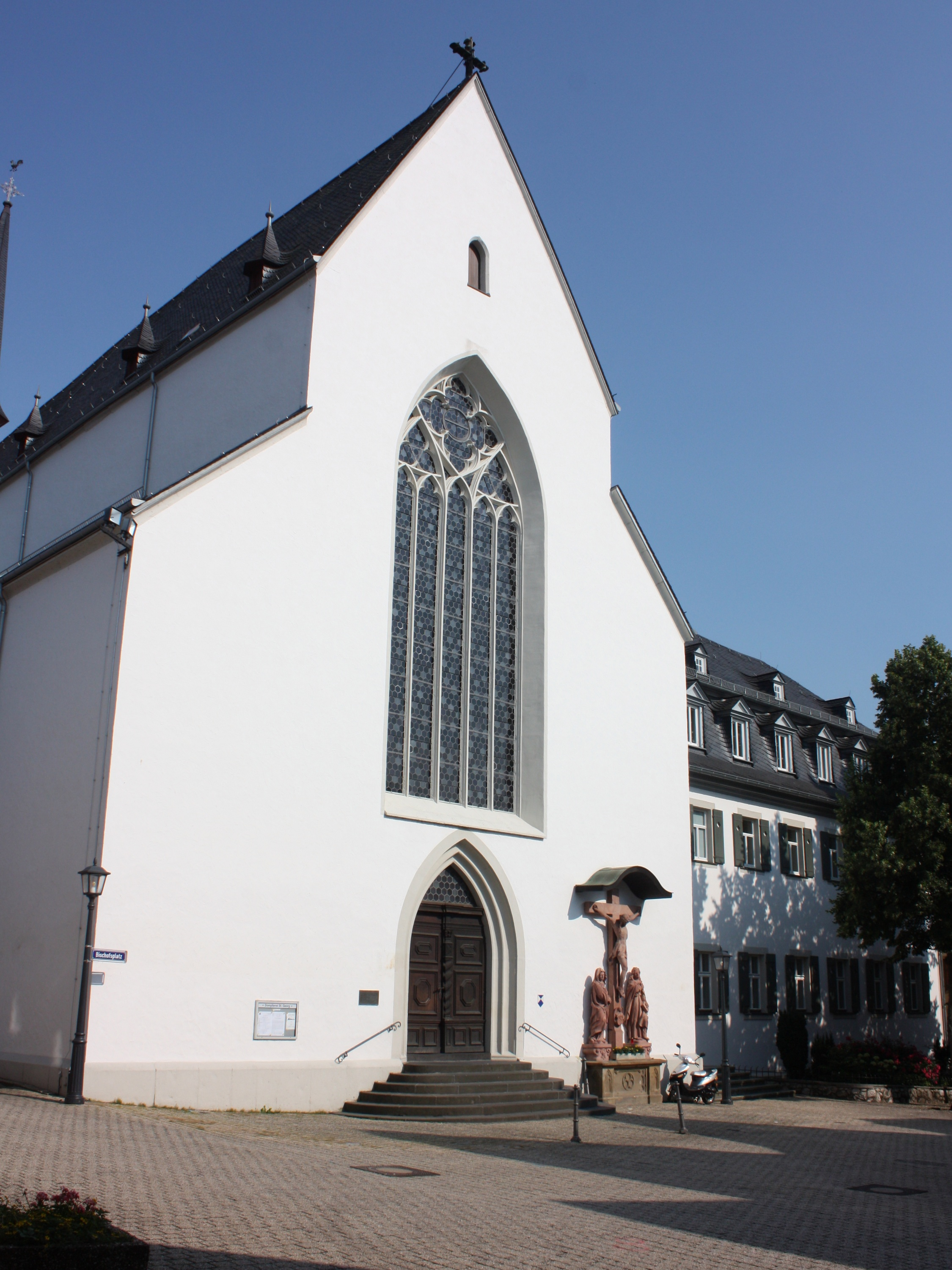 Limburg (Altstadt), Hessen: Ehemaliges Fransikanerkloster "St. Sebastian", heute Bischöfliches Ordinariat und Stadtkirche